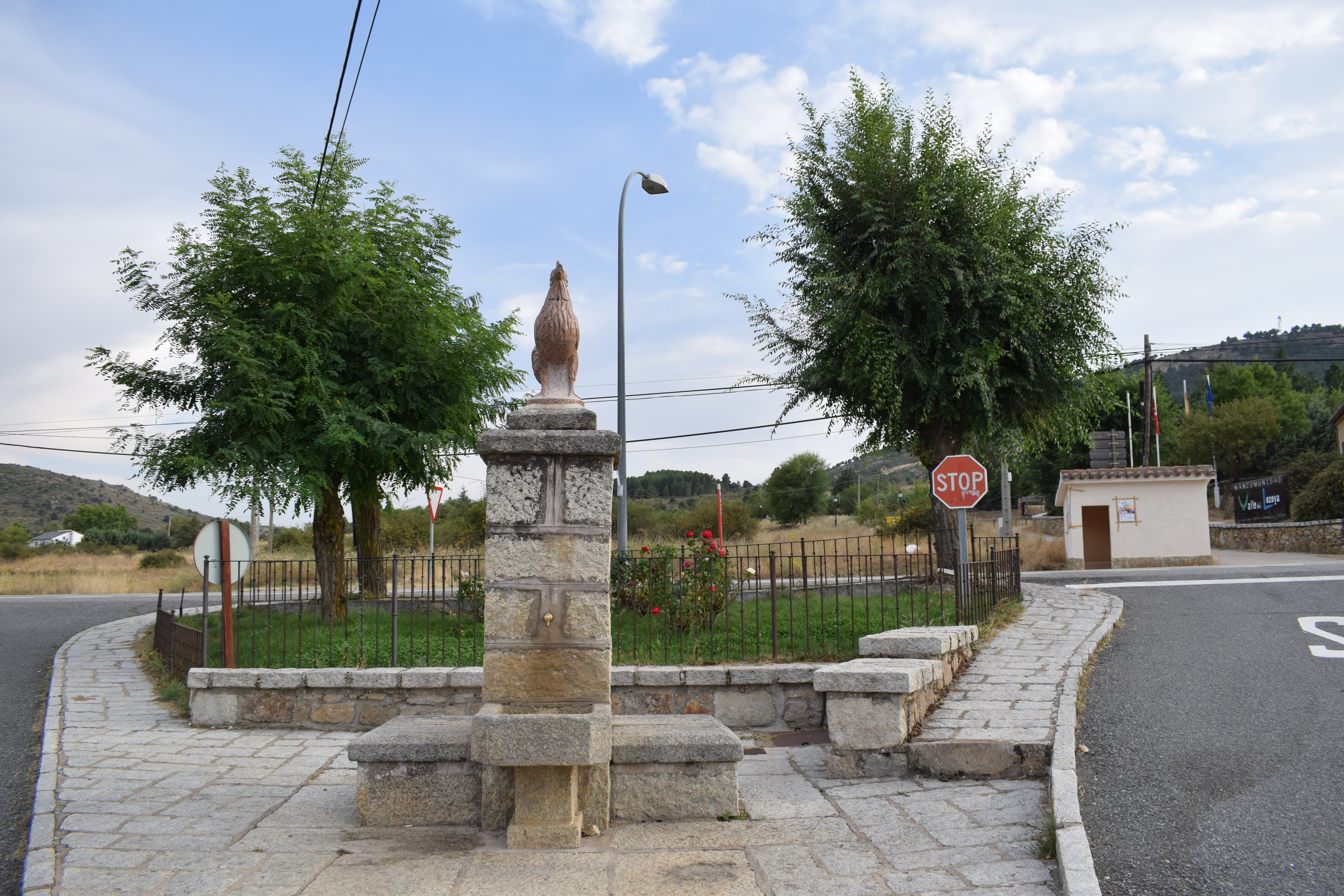 La Fuente de Arriba, El Cuadron (Madrid)